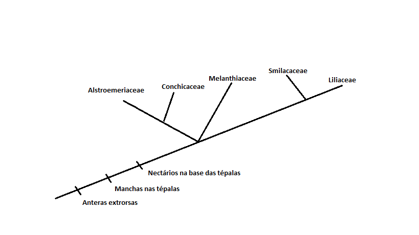 Cladograma mostrando supostas relações filogenéticas dentro do grupo Liliales